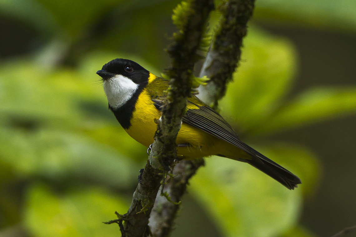 Golden Whistler - Cairns - Queensland_S4E8486